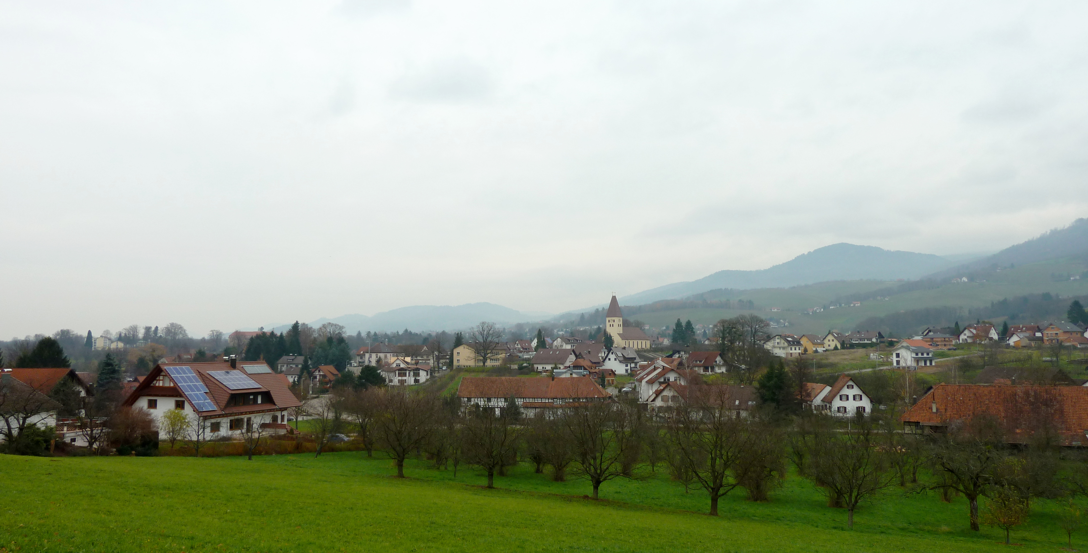 Blick auf Obersasbach, Gemeinde Sasbach, Ortenaukreis, Baden-Württemberg